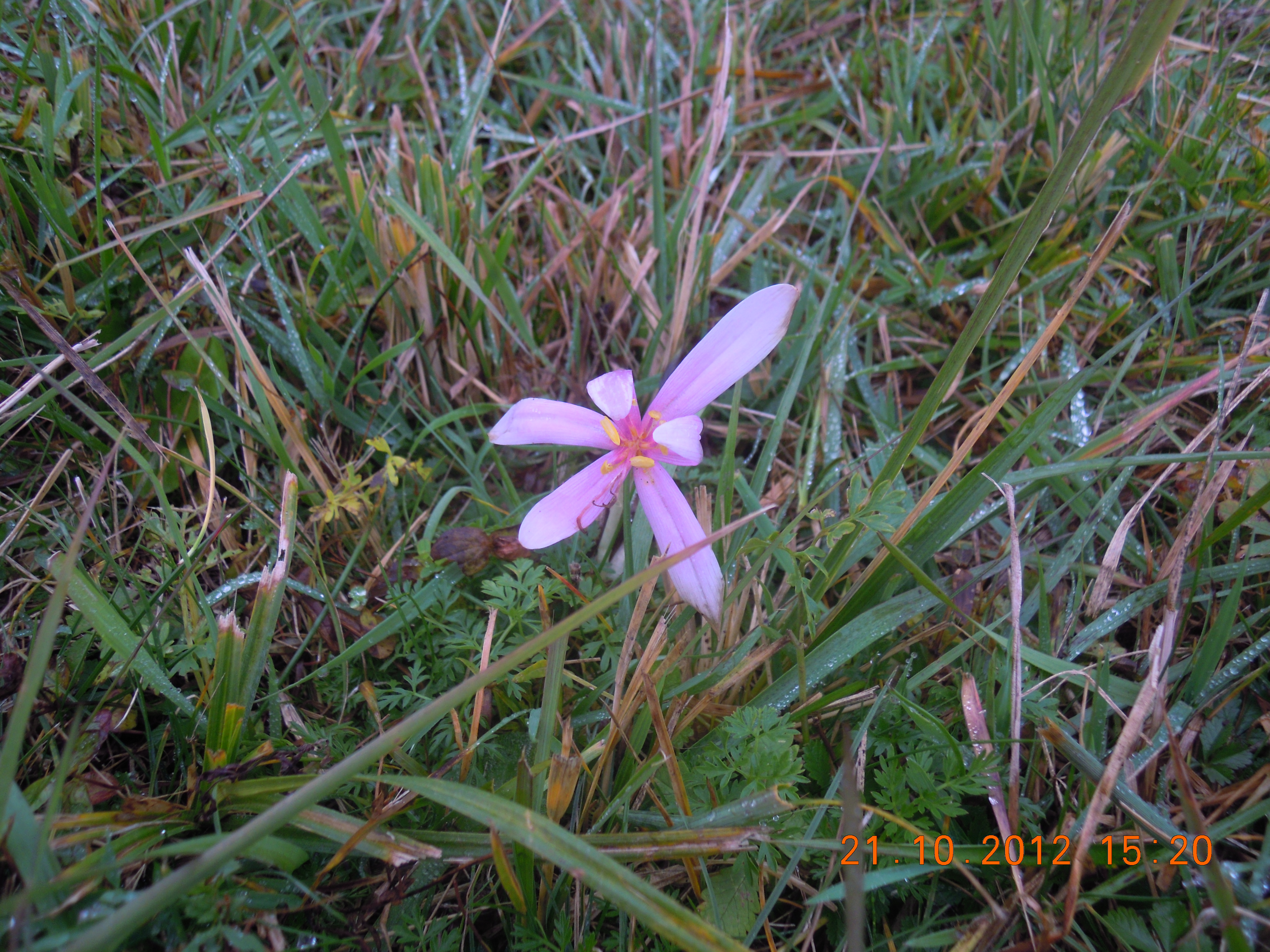 Ocun jesenni(Colchicum autumnale)